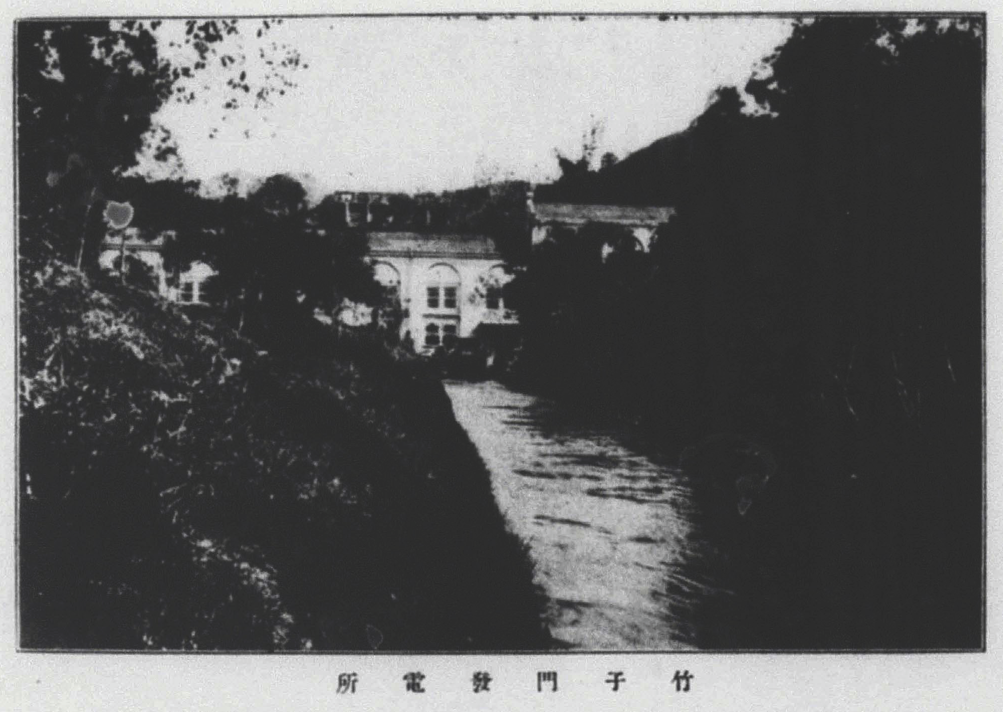 中文（台灣）: 位於高雄美濃的竹子門發電所。